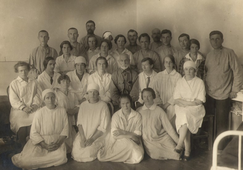 Профессор А.И. Писнячевский с сотрудниками клиники нервных и душевных болезней и её пациентами, 1930 год.